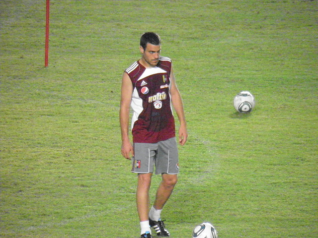 Andrés Túñez entrenando con la Selección de fútbol de Venezuela.